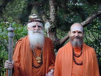 Satguru Sivaya Subramuniyaswami (left) with Satguru Bodhinatha Veylanswami (right).